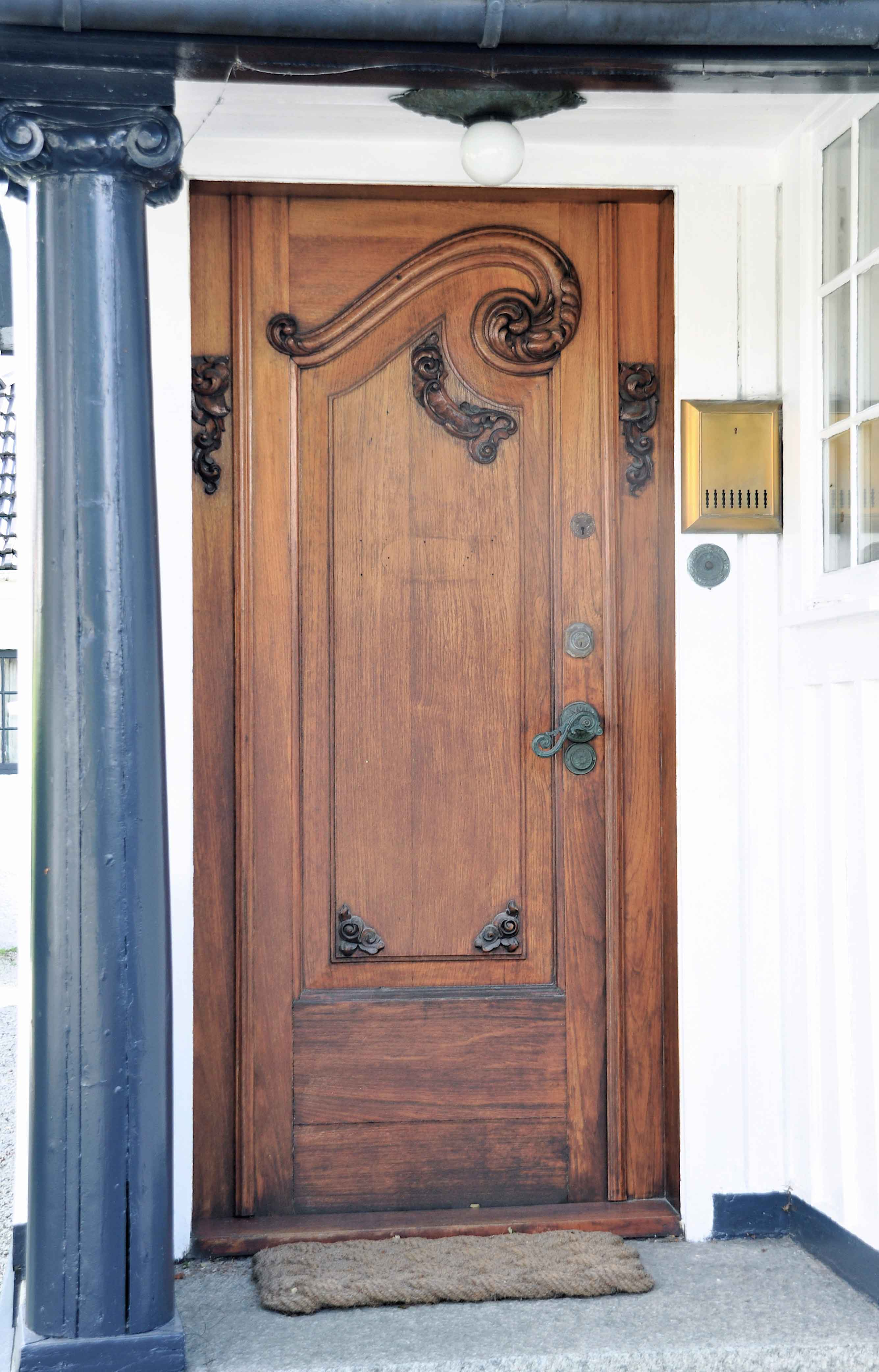 Inngangsparti, Eiganesveien 82, Michael Slettebø